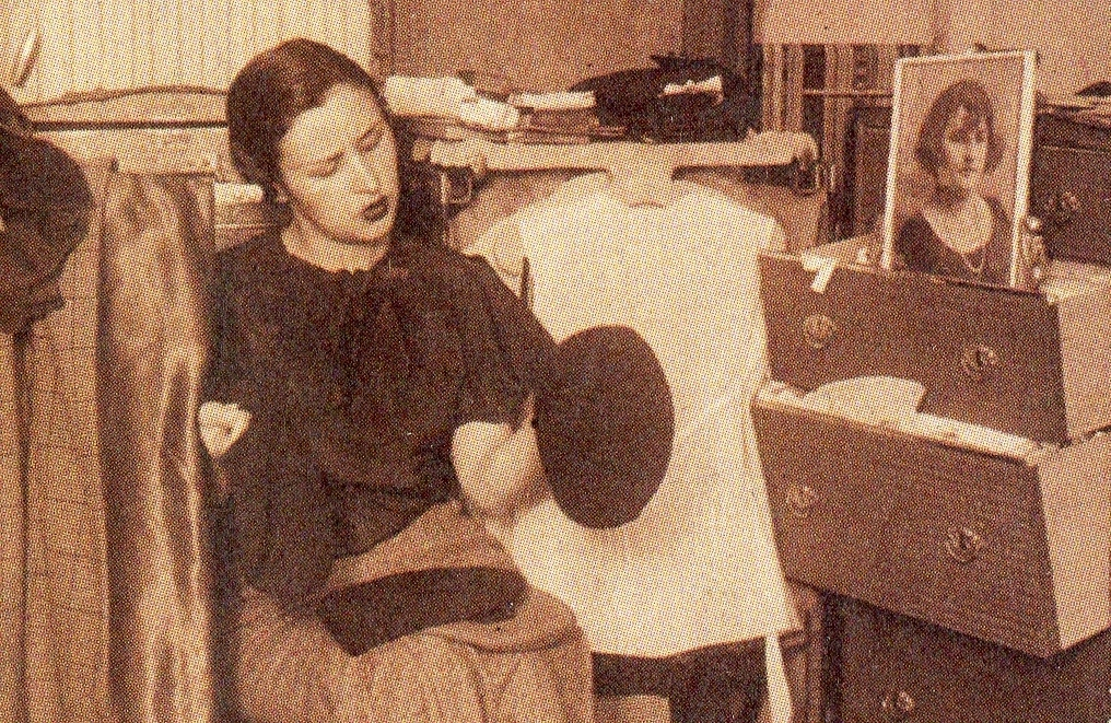 Tita Merello eligiendo su vestuario.